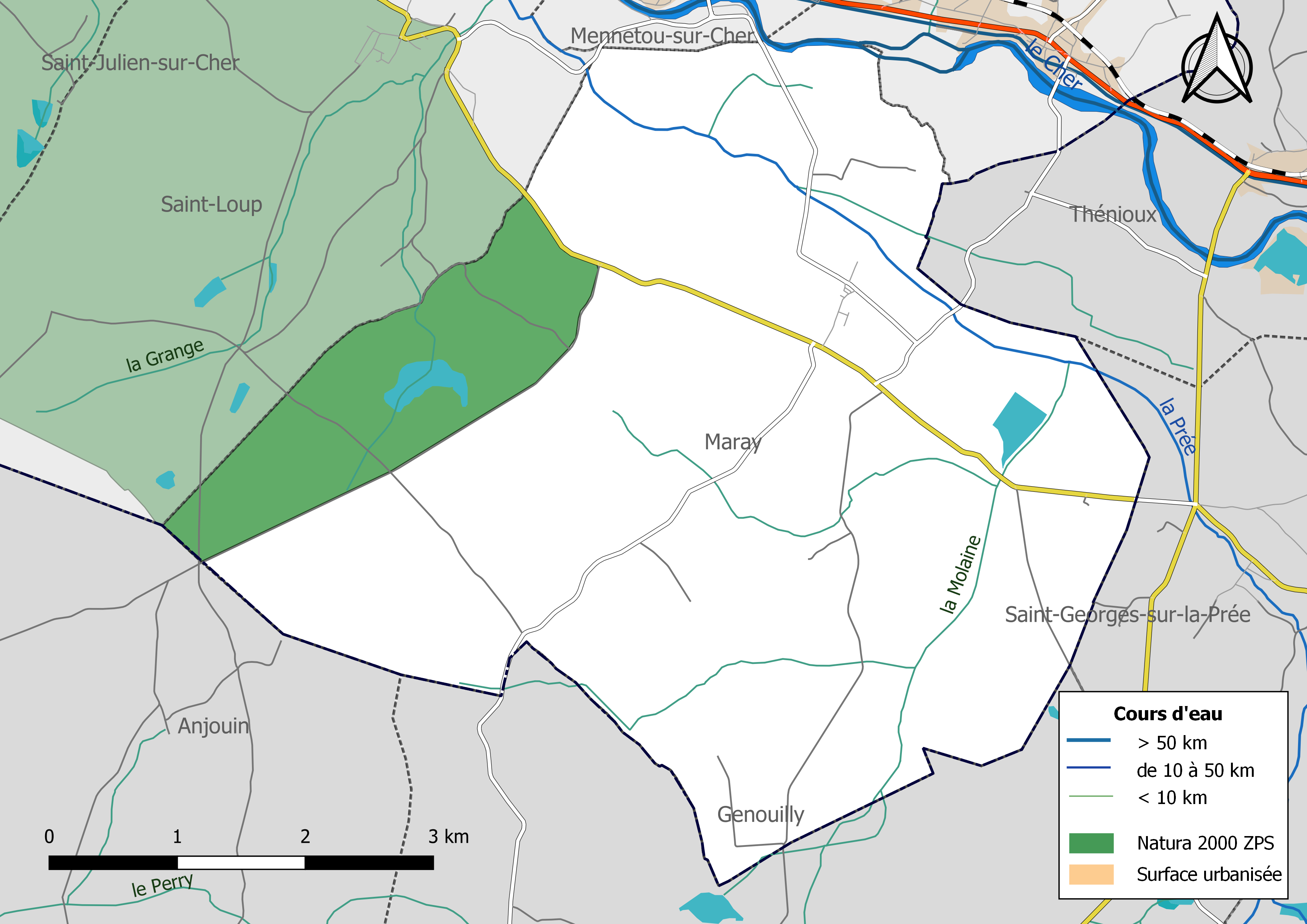 Carte du site Natura 2000 de type ZPS de la commune de Maray (France).